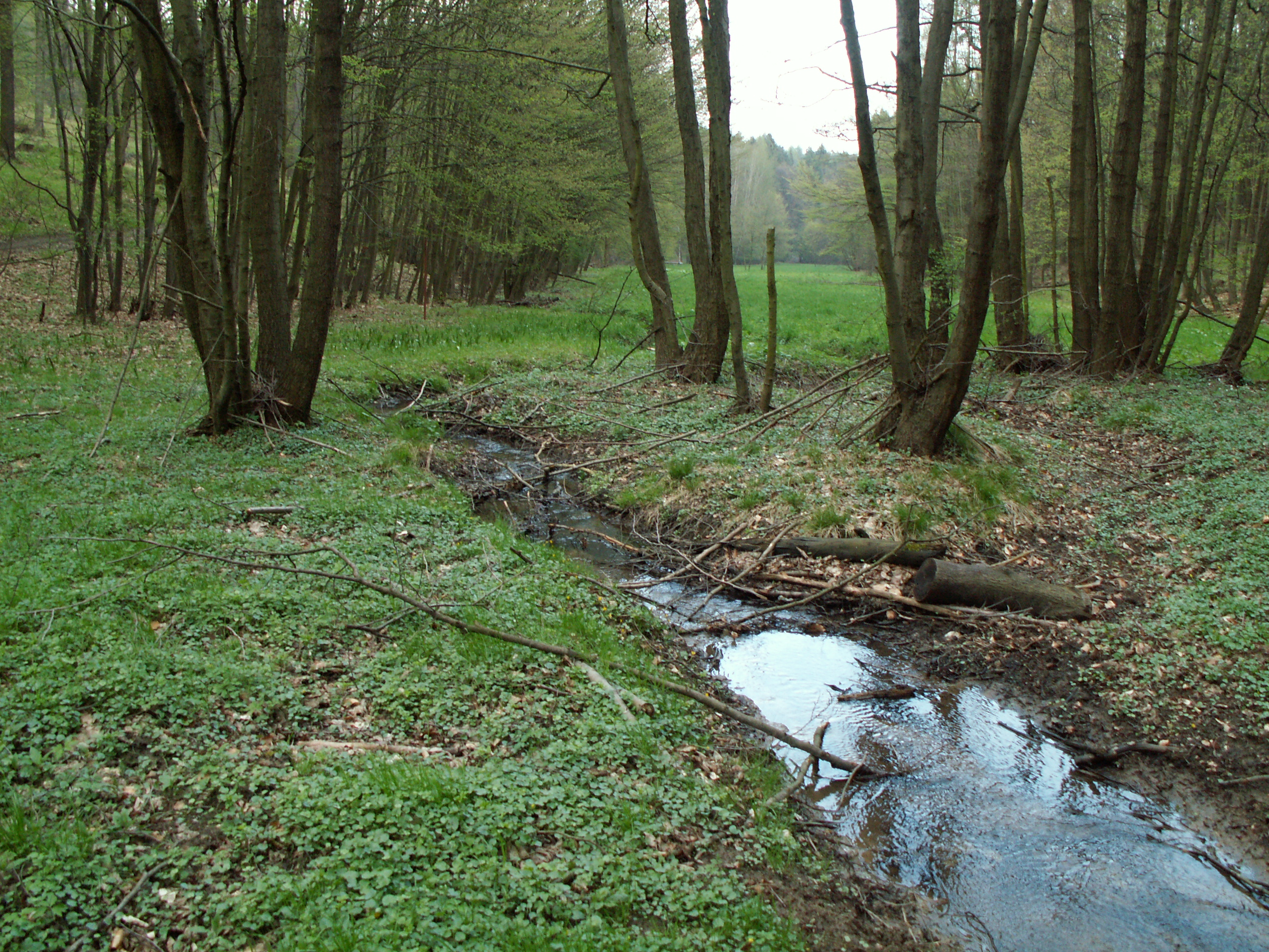 Potok v přírodní památce Augšperský potok obkružuje skupinu stromů dvěma rameny, z nichž jedno je momentálně vyschlé, a vytéká z lesa do nivní louky.